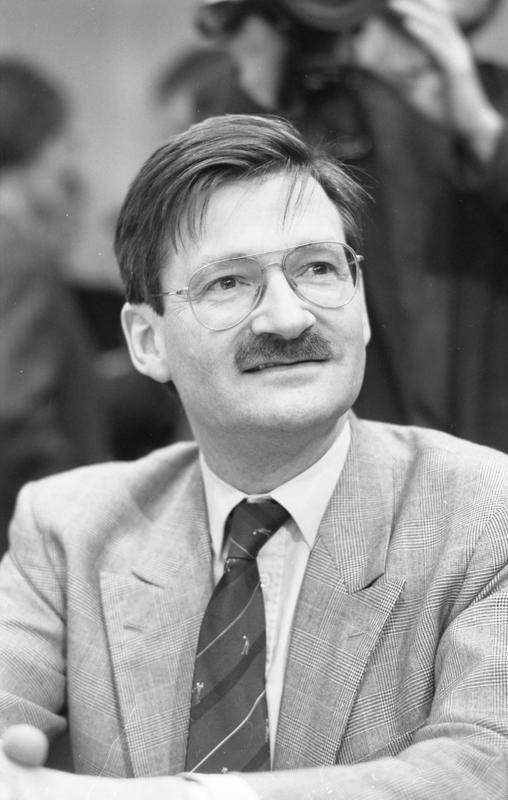 10.1.1991 Sitzung der FDP-Bundestagsfraktion im Bundeshaus (Neues Abgeordneten-Hochhaus).